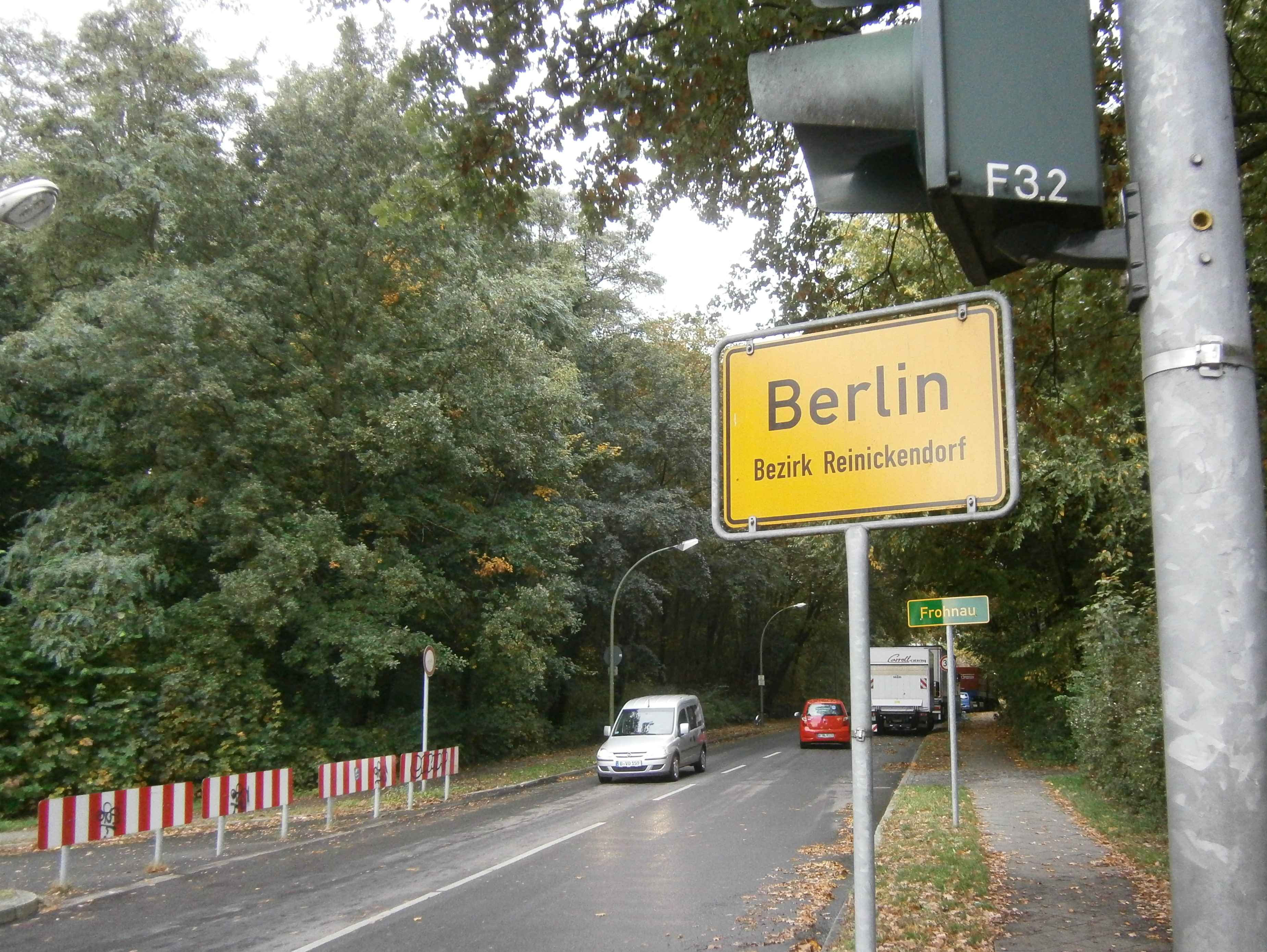 Fürstendamm ist eine Straße in Berlin-Frohnau. Blick von Glienicke/Nordbahn Oranienburger Chaussee auf den Ostbeginn der Straße.